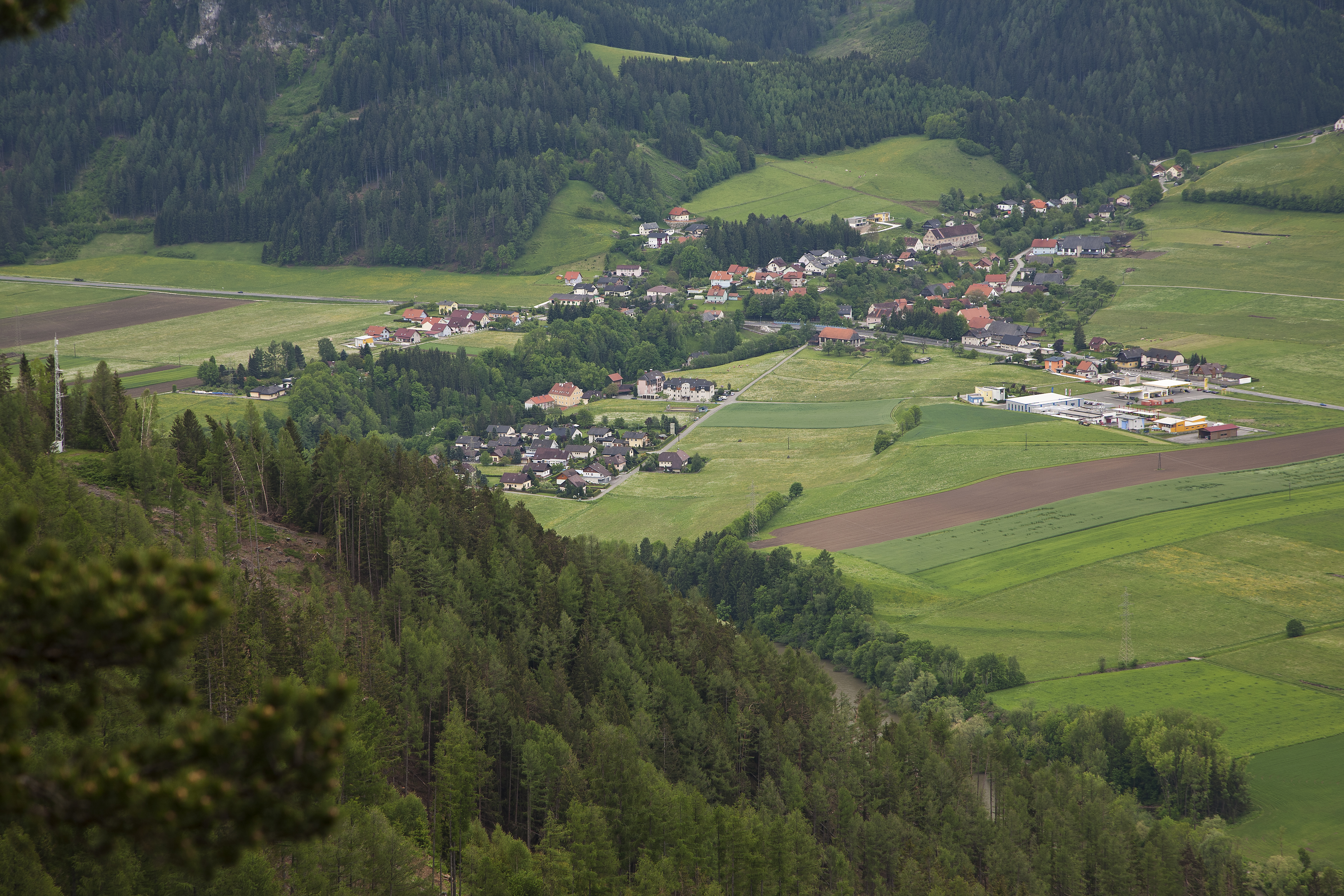 Der Ort Rothenthurm von Nordwesten